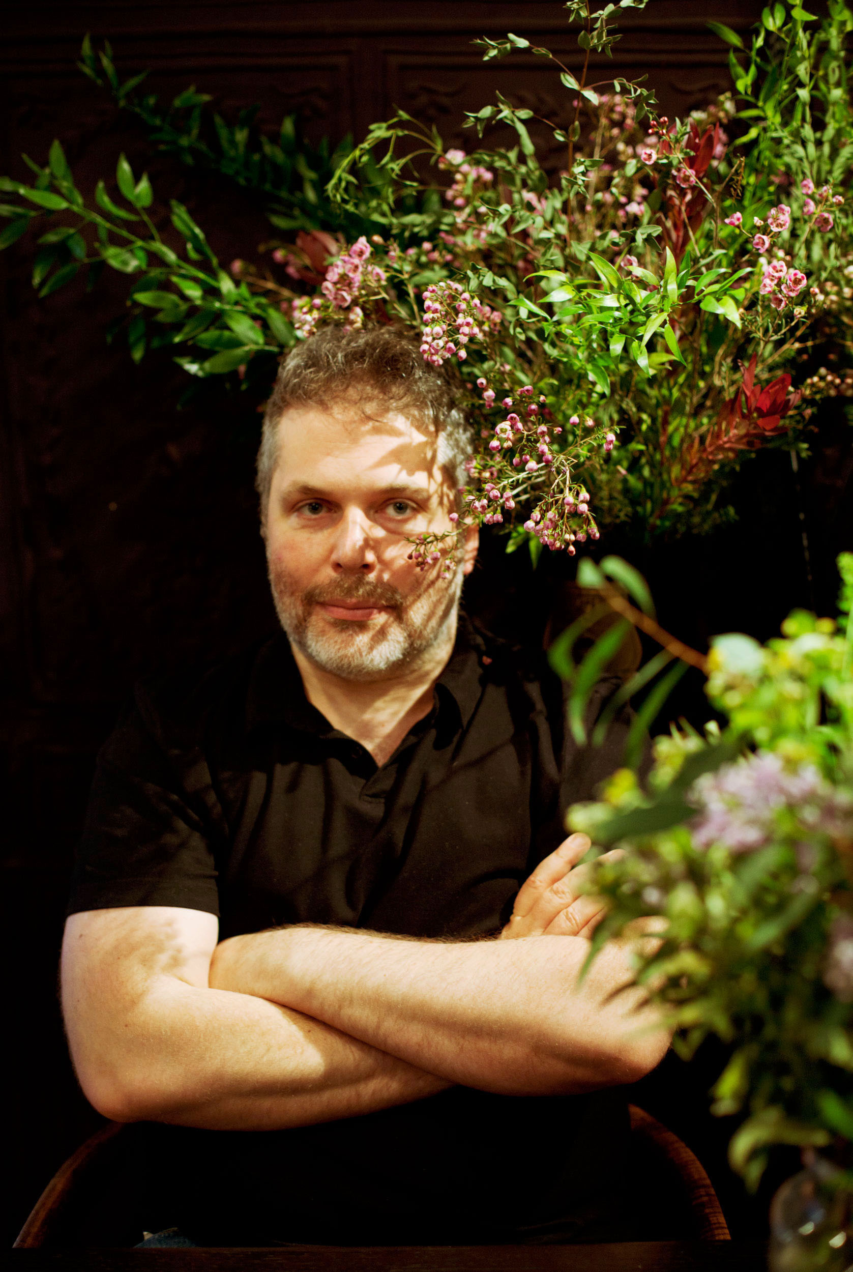 portrait made in Moscow, spring 2014